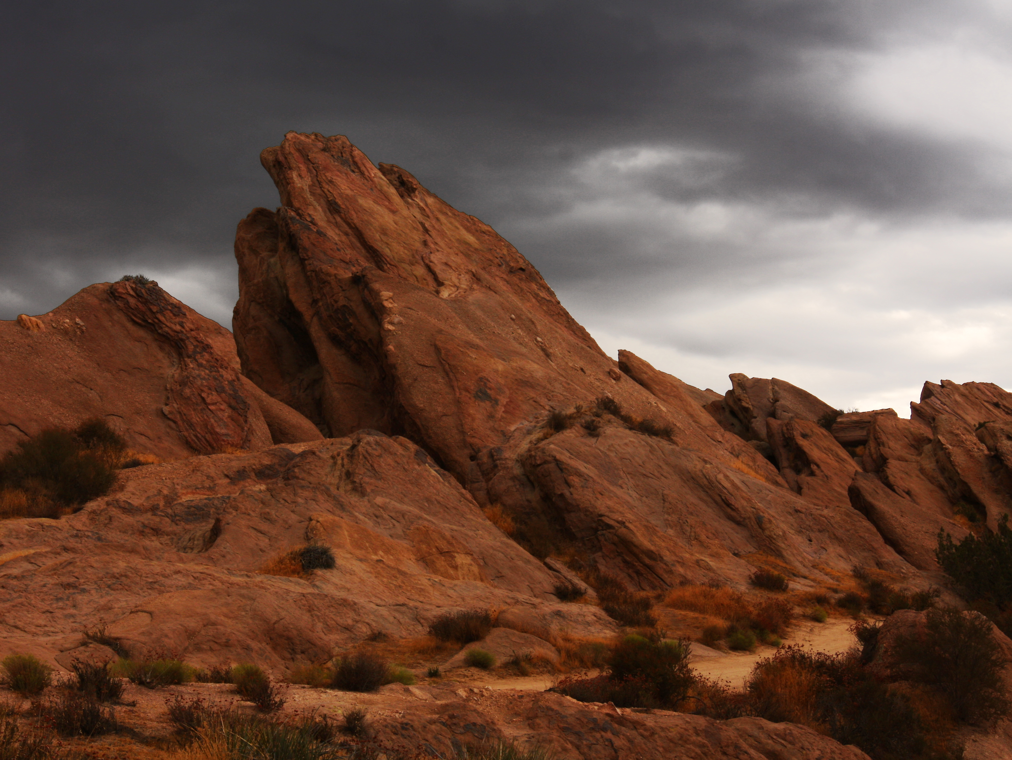 Vasquez Rocks